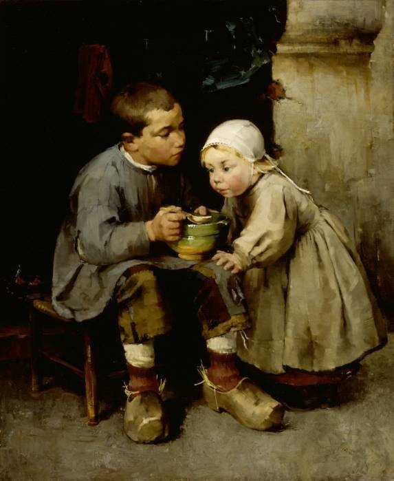 Helena Schjerfbeck Pikkusiskoaan ruokkiva poika